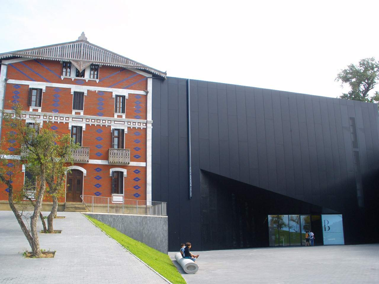 Palacio de Aldamar-Cristobal Balenciaga Museoa (Getaria)